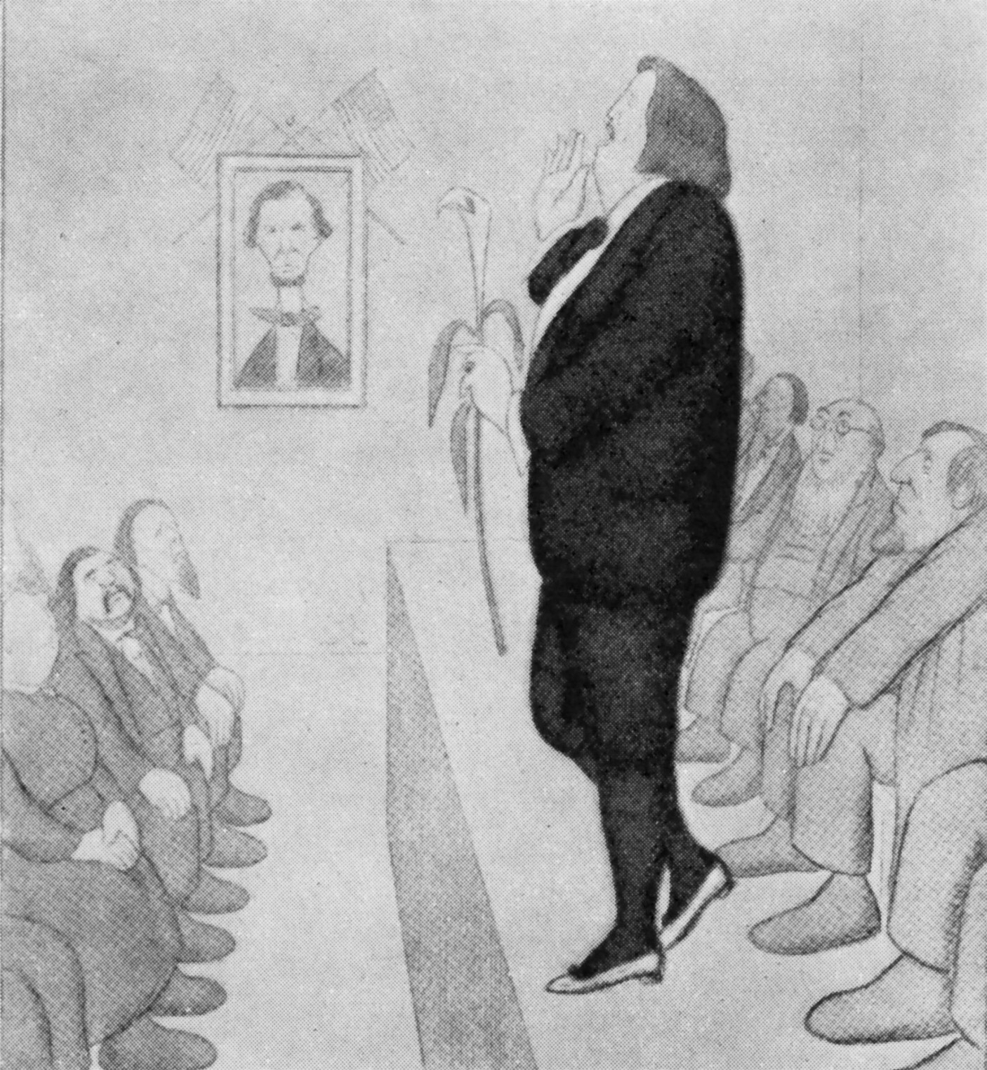 Karikatur von Oscar Wilde während seiner "ästhetischen" Lesetour durch die USA.